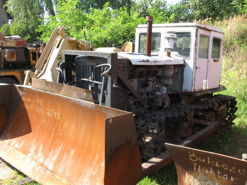 Pásový traktor DT - 54